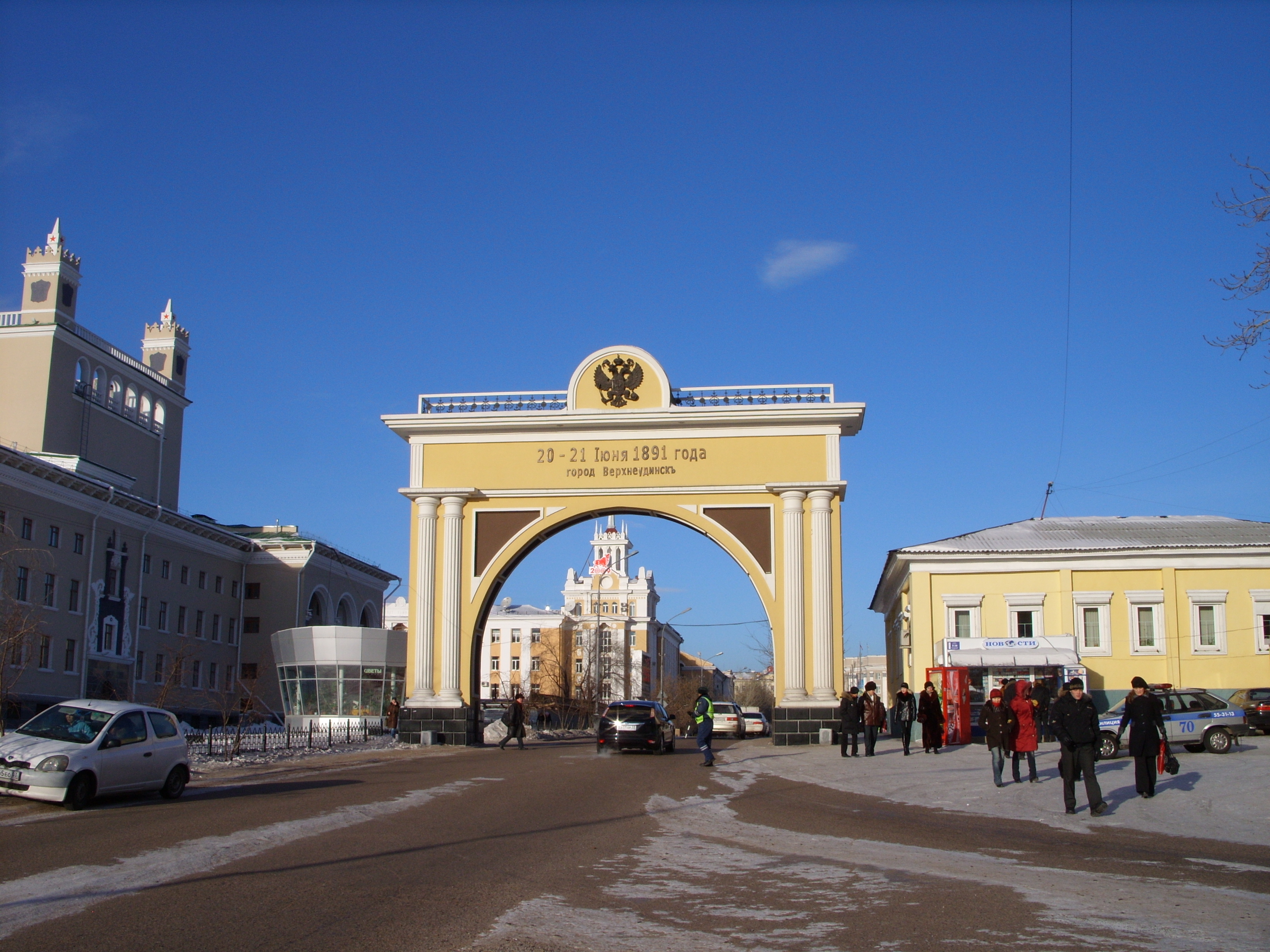 снимки декабря 2008 г.